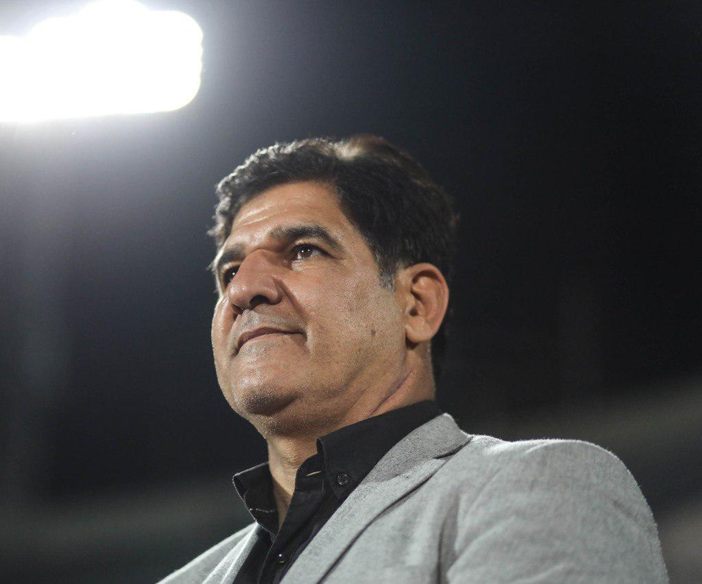 گزارش تصویری از دیدار استقلال - ماشین سازی که در نیمه اول با تساوی بدون گل به پایان رسید